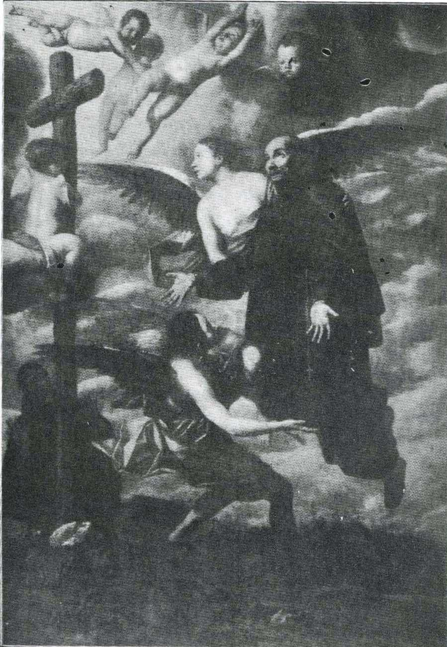 Domenico Marolì, San Pietro d'Alcantara, Museo Regionale di Messina.